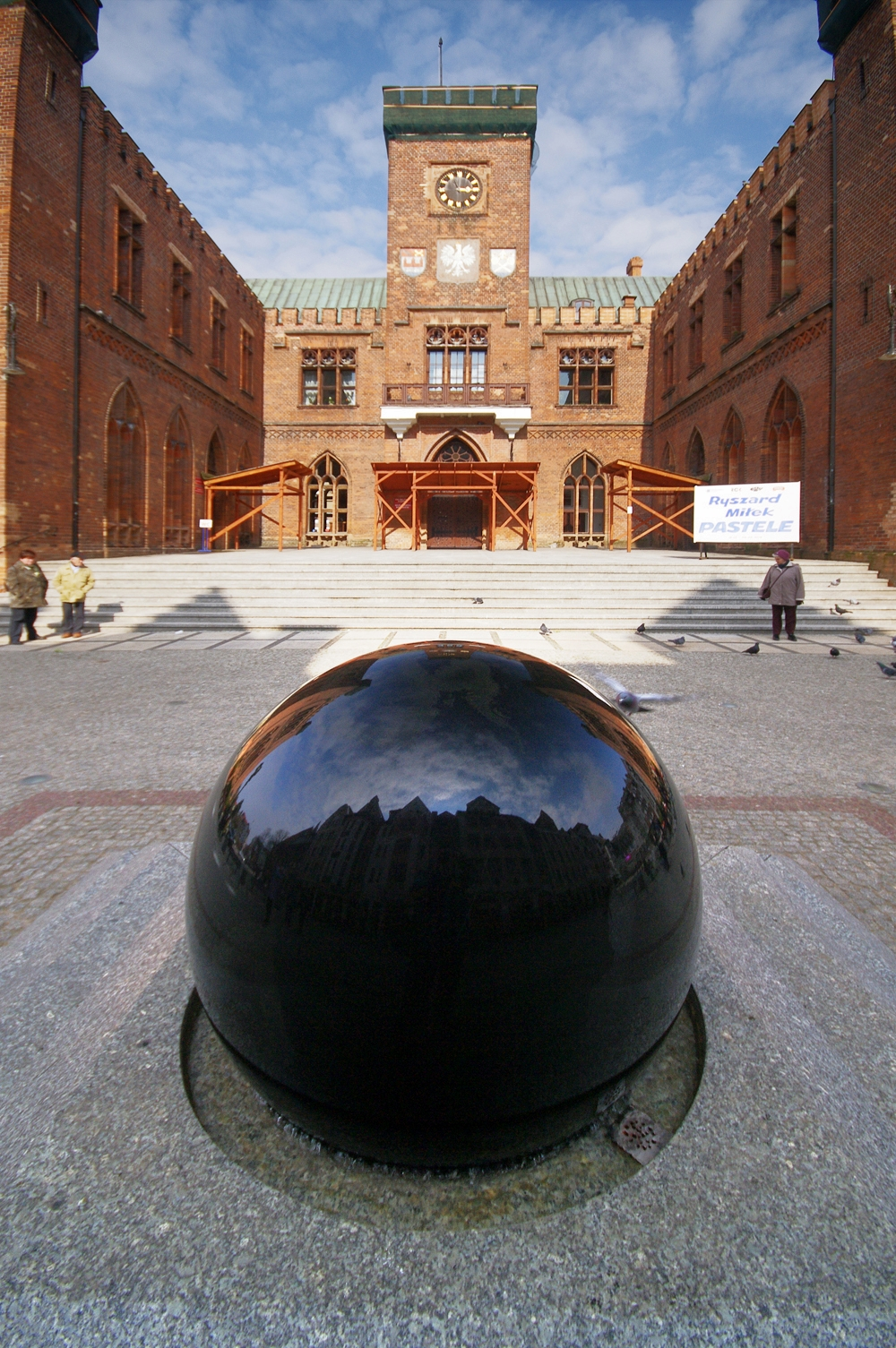 Główne wejście do kołobrzeskiego ratusza